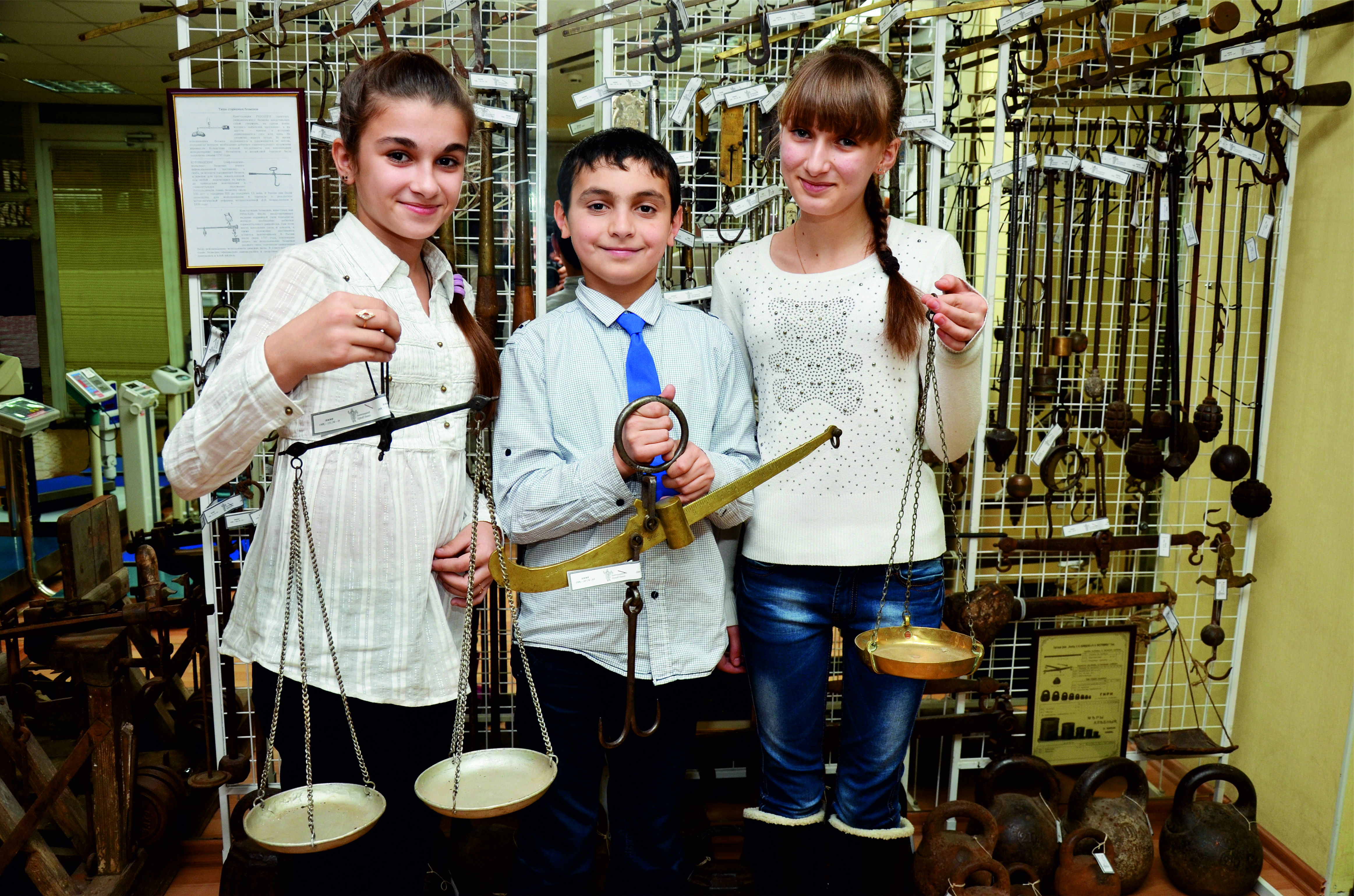 Volgograd historical-technical Museum of Russian vistroena" is the pride of the Volgograd Plant Weighing Technology - open for free visits